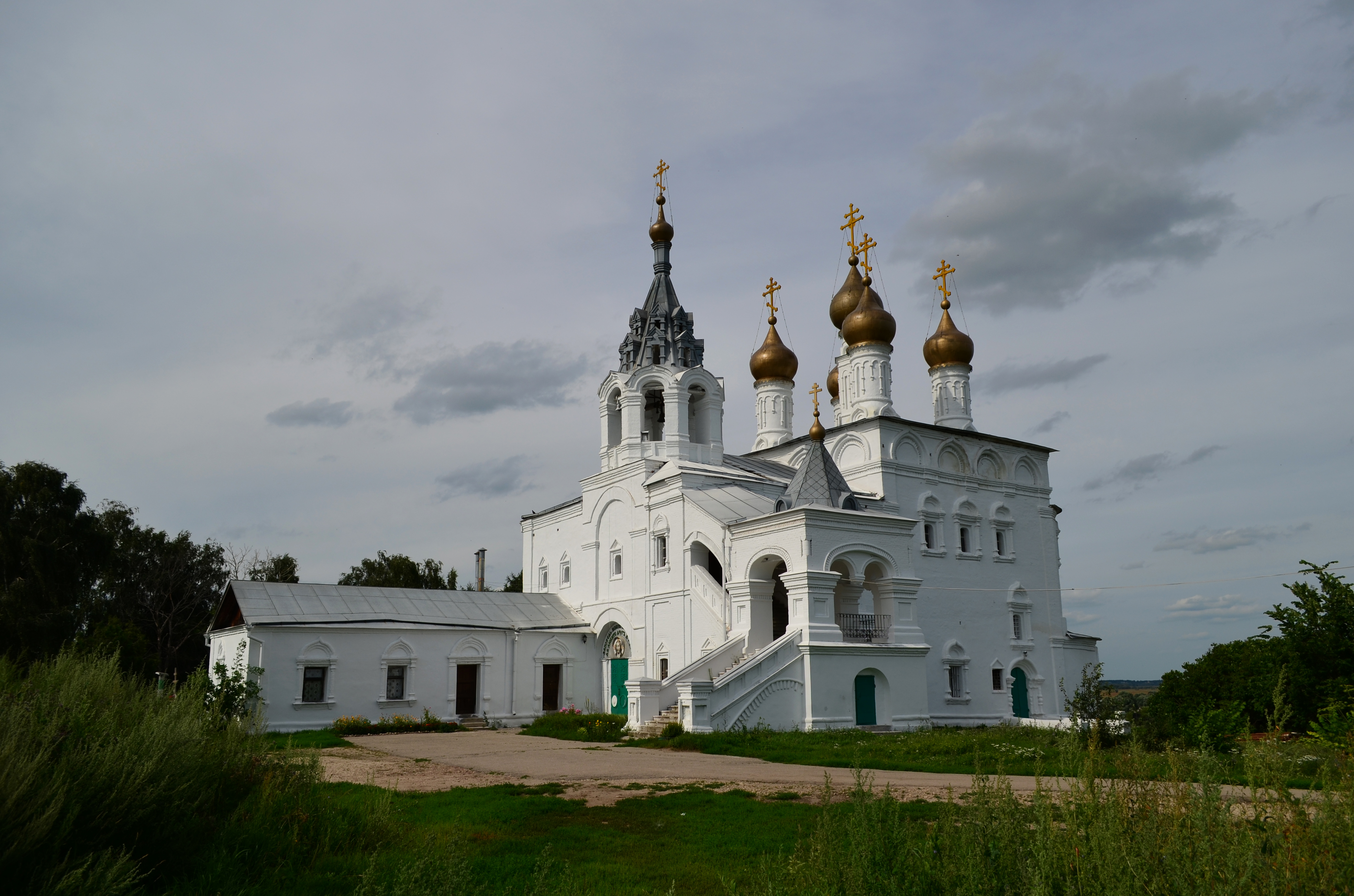 Церковь Воскресения Христова: Исады, Спасский район, Рязанская область